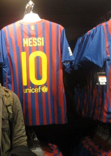 Camiseta del FC Barcelona de Leo Messi.